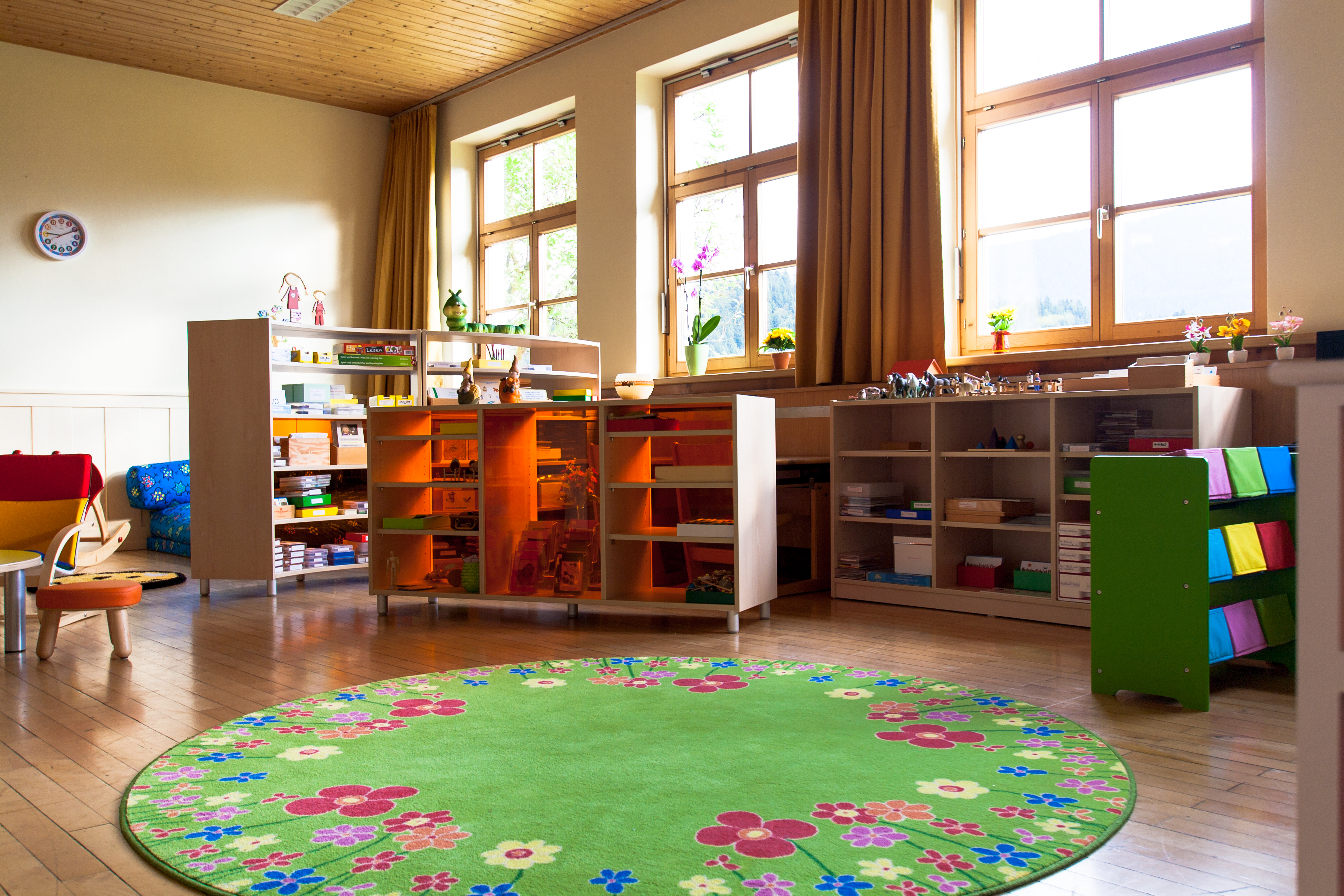 Die Klassenräume der Volksschule Latschau sind auf die Bedürfnisse des reformpädagogischen Unterrichts ausgelegt.